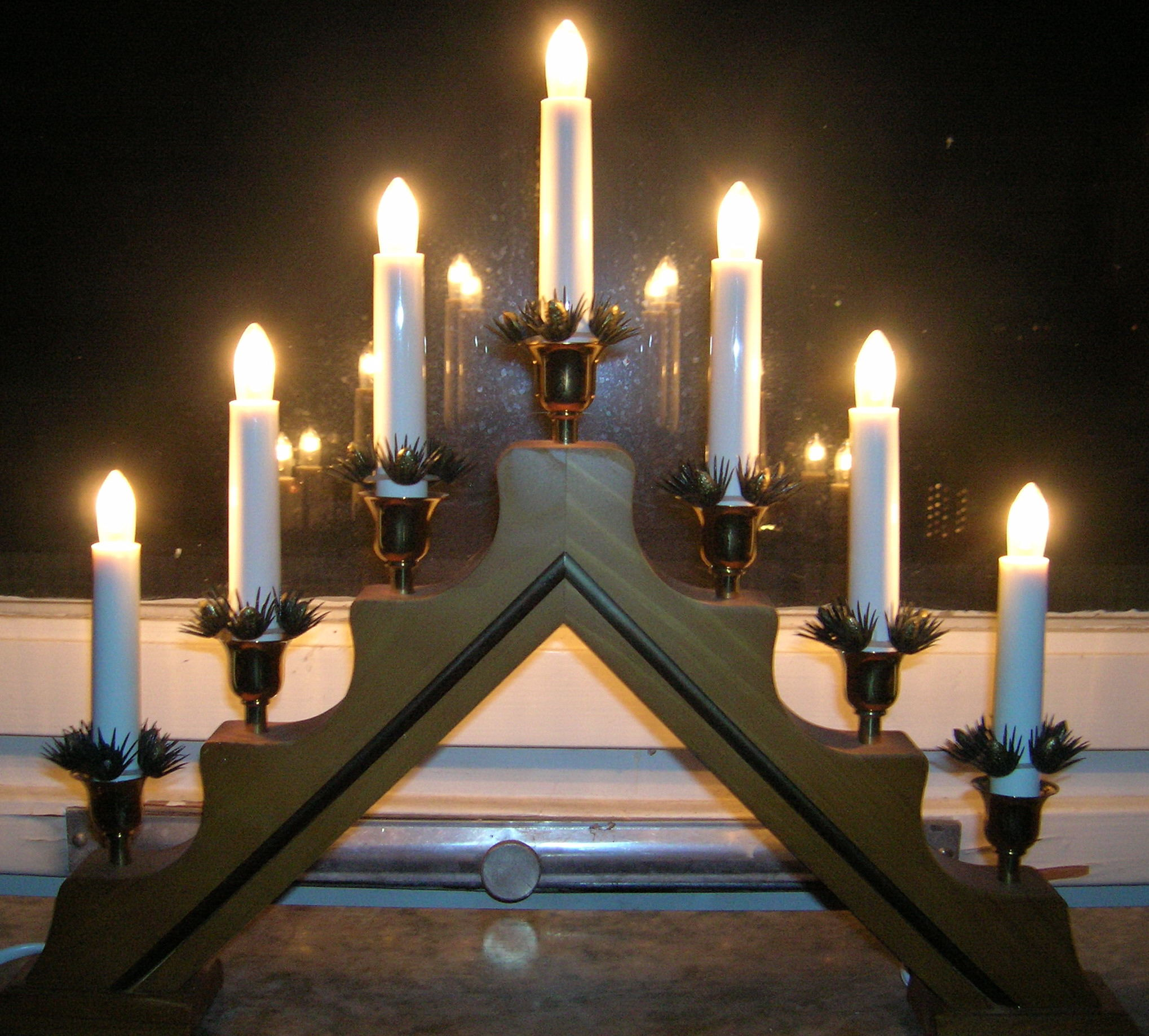 Elektrisk adventsljusstake tillhörig mig och min hustru.